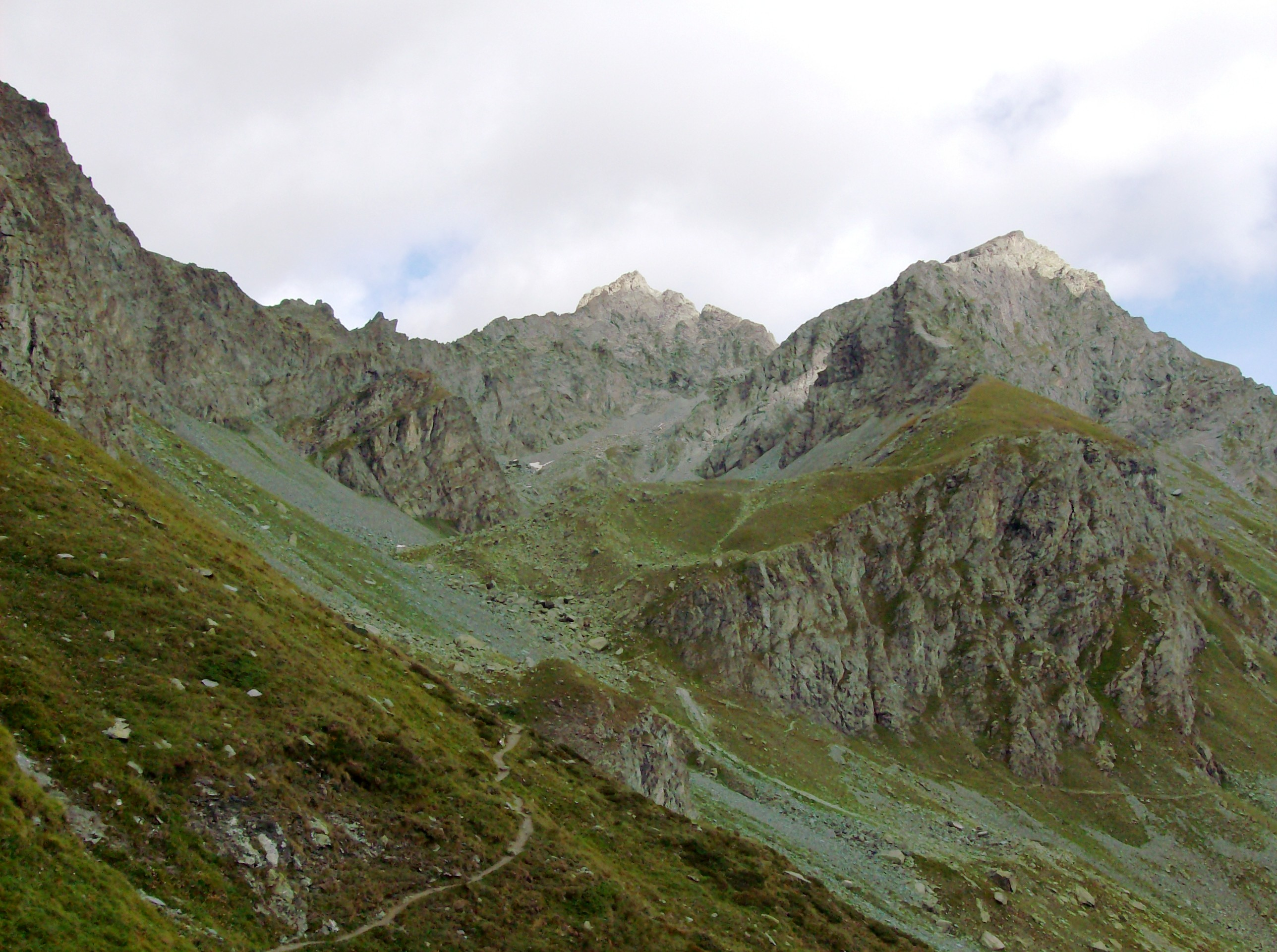 Il monte Granero visto da sud, dal sentiero del postino. Sulla destra, il monte Meidassa; tra le due montagne, il canalone che conduce al passo Luisàs.